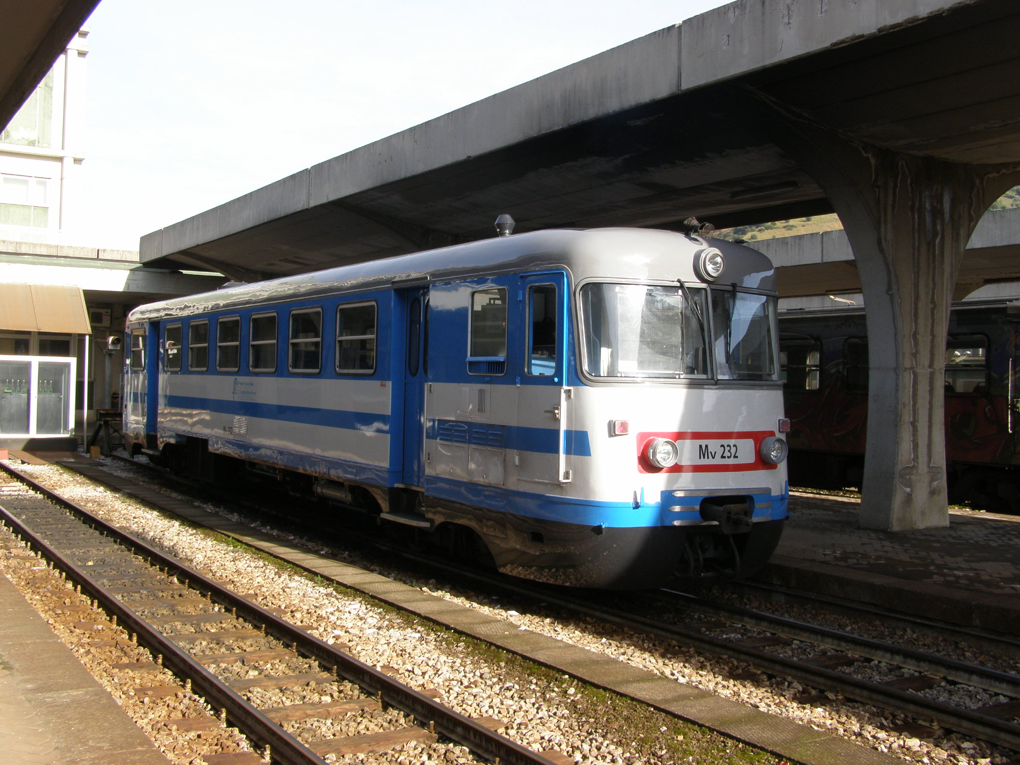 M2.232 MV a Cosenza Vaglio Lise